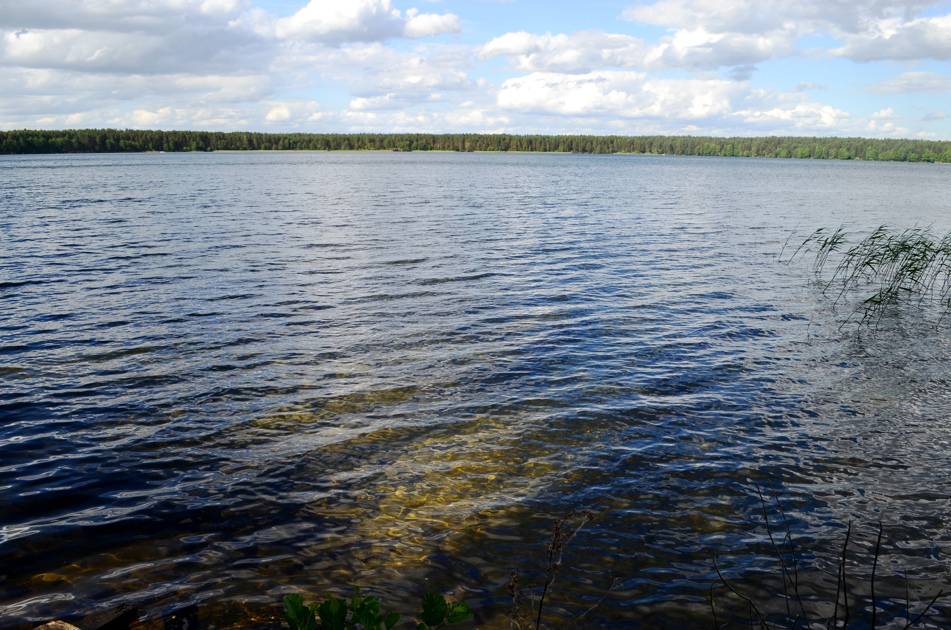 Lavyso ežeras, Varėnos raj.